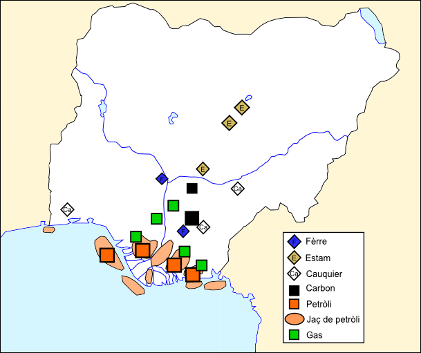 Ressorsas naturalas de Nigèria.